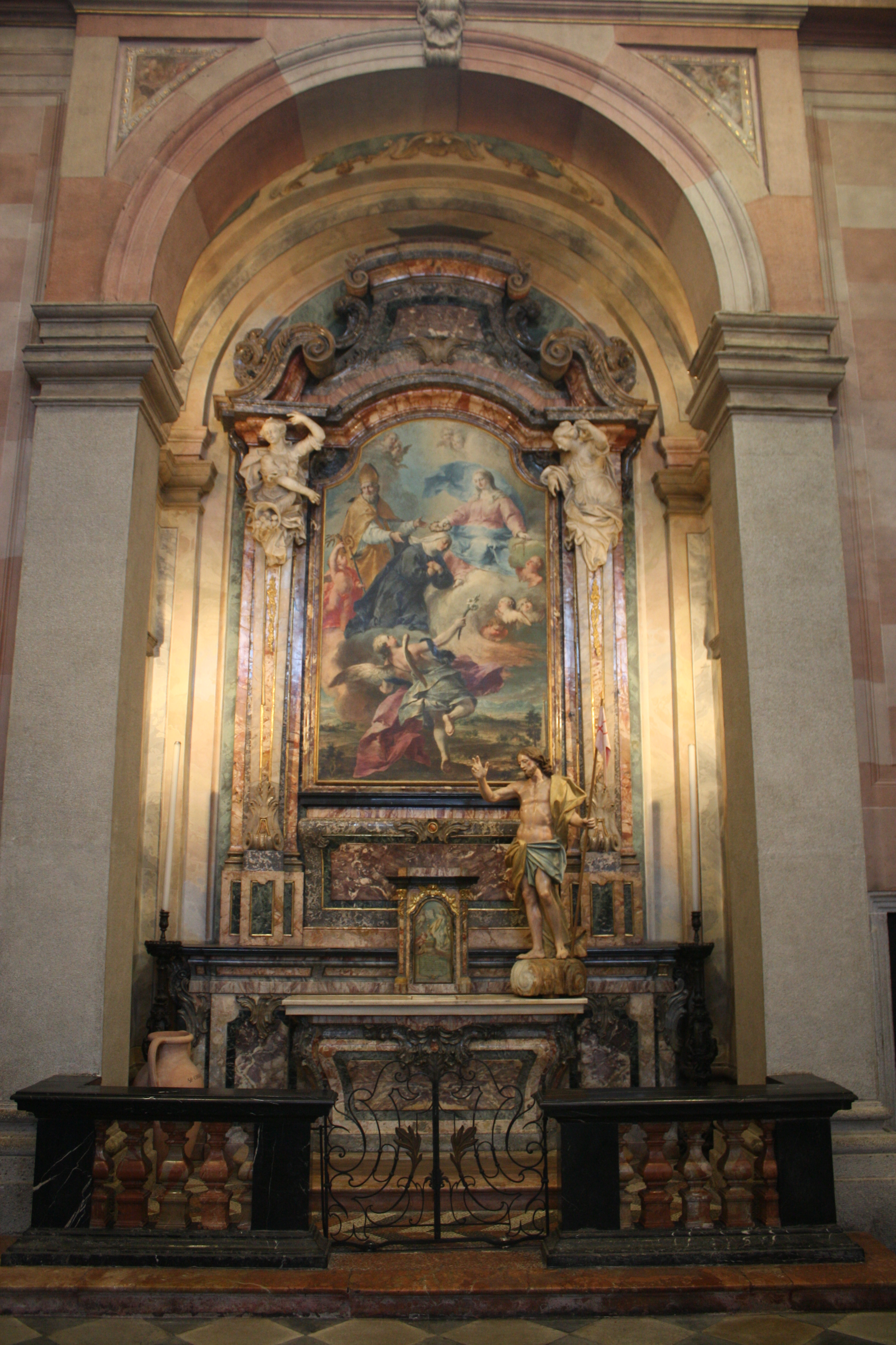 La cappella di Sant'Ambrogio e Beata Giuliana nella Basilica di San Giovanni Battista a Busto Arsizio.